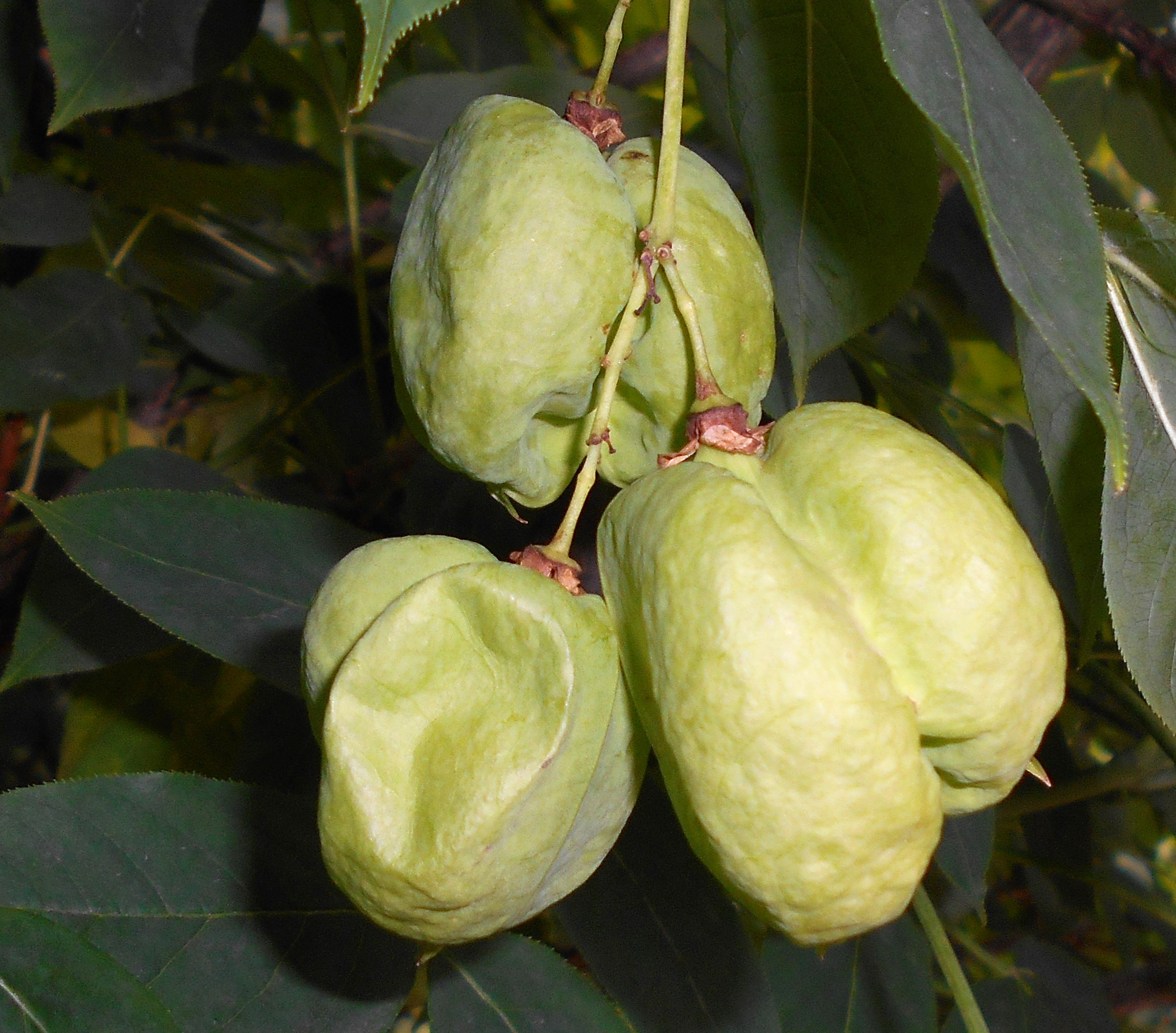 Kłokoczka południowa (Staphylea pinnata), Ogród Botaniczny UMCS w Lublinie